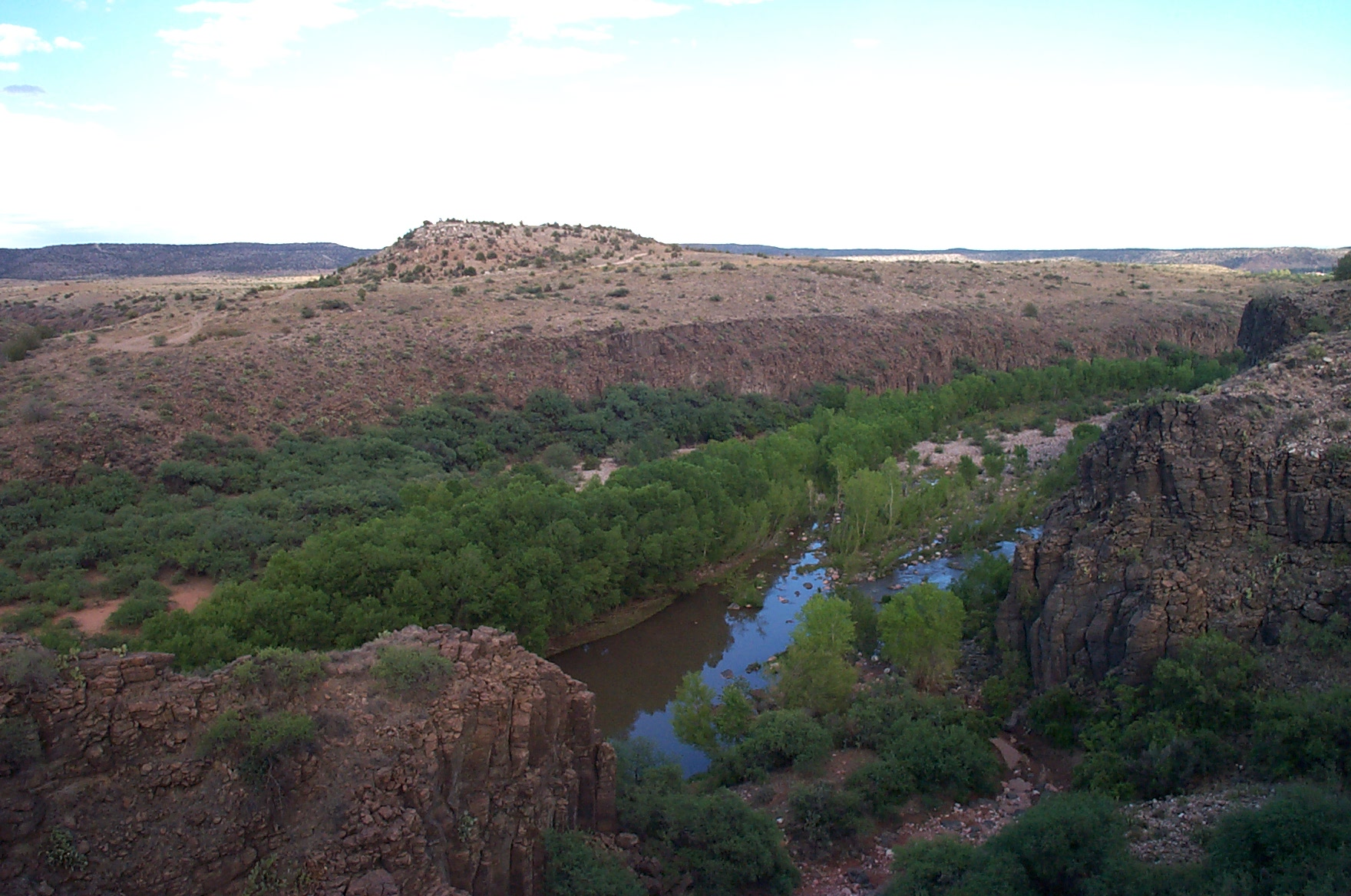 Verde River, Arizona.